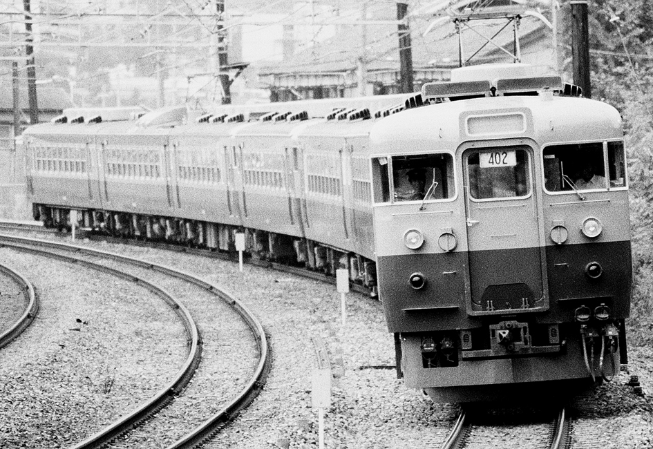 国鉄165系急行形電車 急行「比叡」